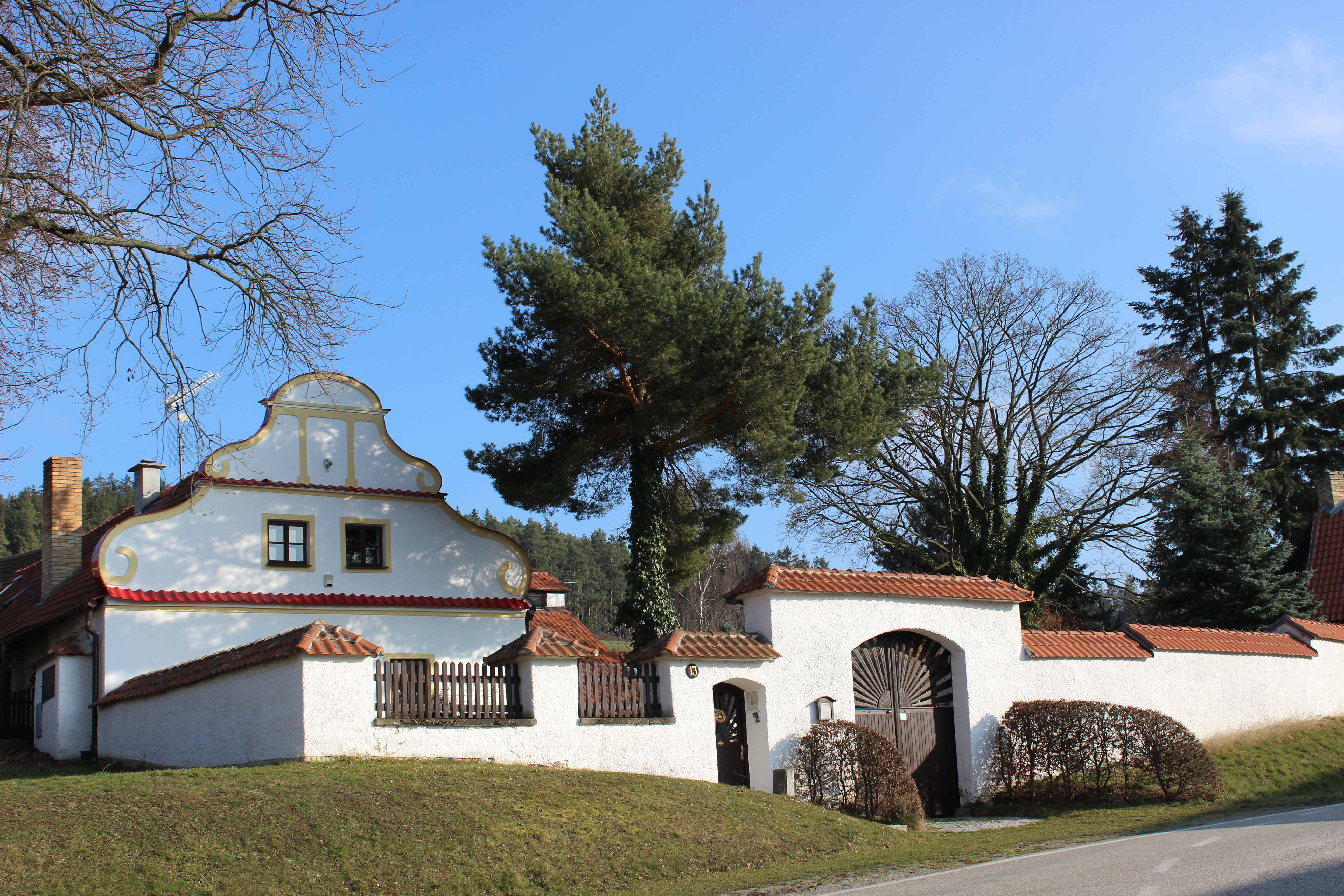 Venkovská usedlost čp.13. Třešovice v okrese Strakonice, kraj Jihočeský. Česká republika.